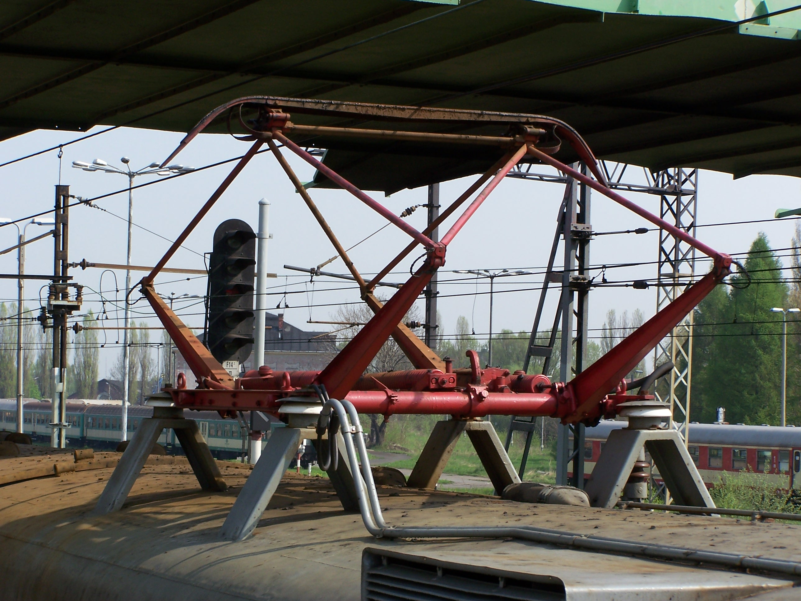 Pantograf